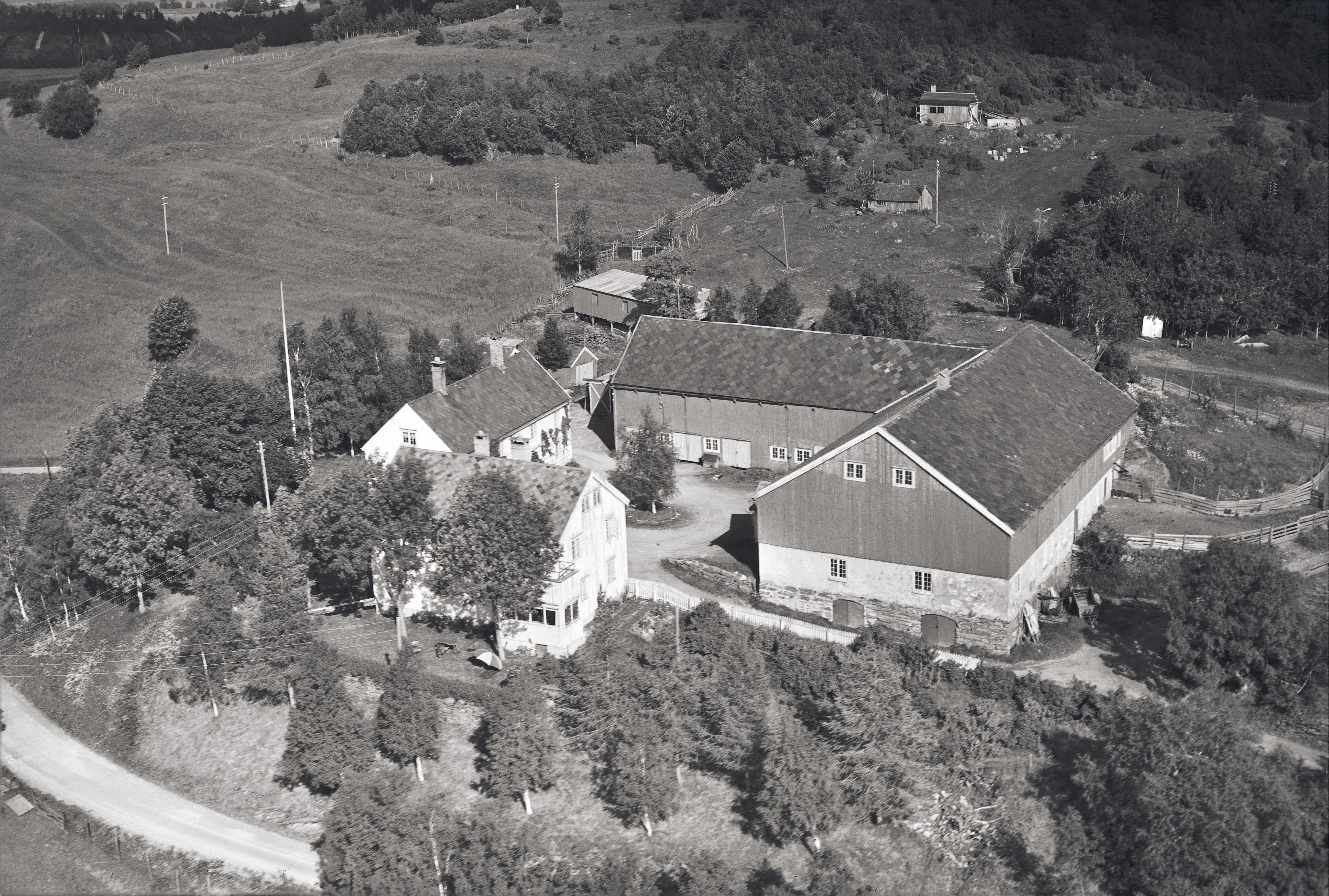 Søndre Steinan (eller Øvre Steinan) i Strinda kommune. Gårdsanlegg med våningshus, låve, fjøs, trær, jorder.